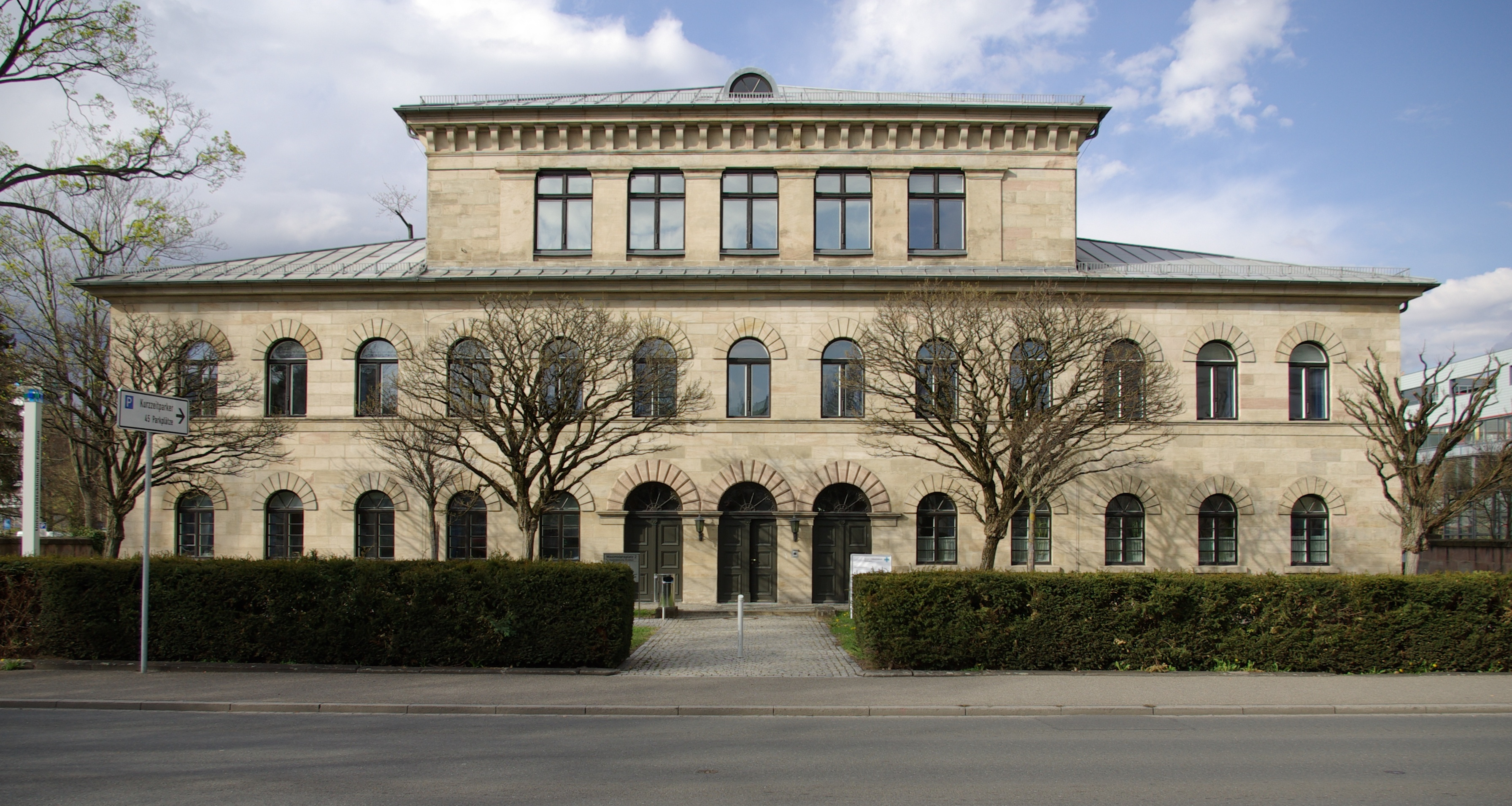 Direktion des Universitätsklinikums Erlangen im Gebäude der ehemaligen Kreisirrenanstalt am Maximiliansplatz 2 in Erlangen.